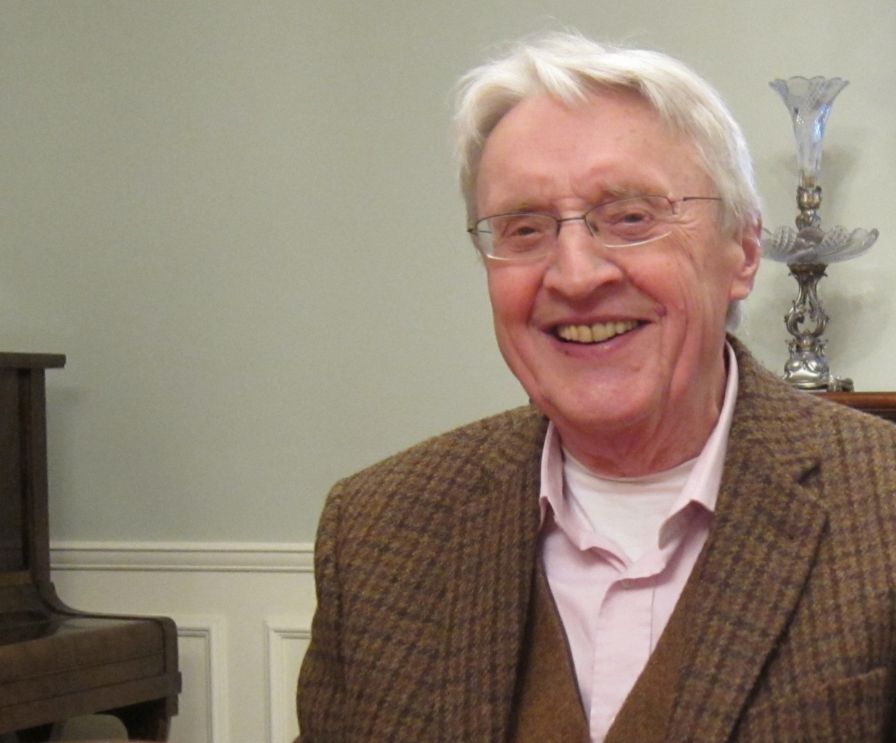 Studienleiter Richard Trimborn in Sofia, Vorbereitung der "Walküre" im Opernhaus Sofia